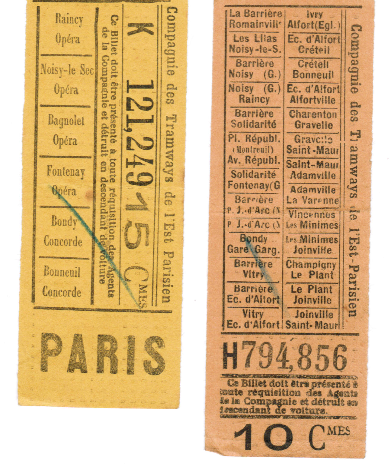 Billets de tramway parisien émis par la Compagnie des tramways de l'Est-Parisien. Cette compagnie a été intégrée dans la STCRP (ancêtre de l'actuelle RATP) en 1921